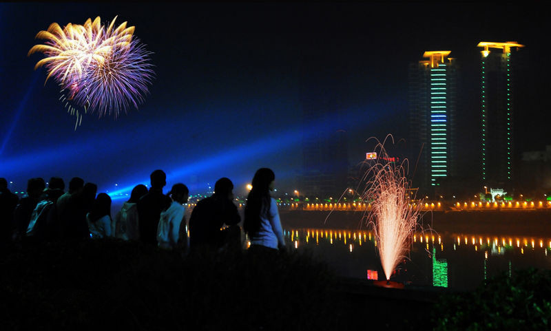 市民休闲盛会